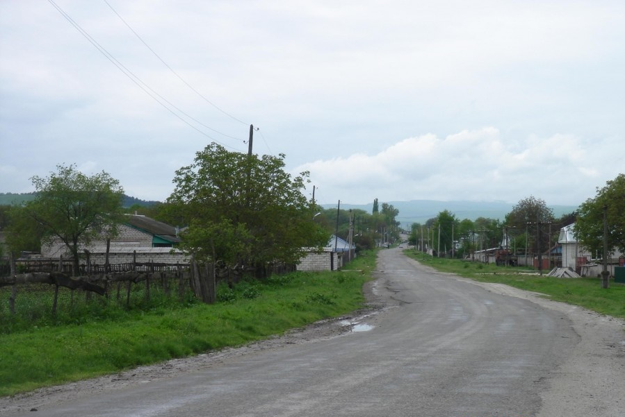 Въезд в аул Эльбурган